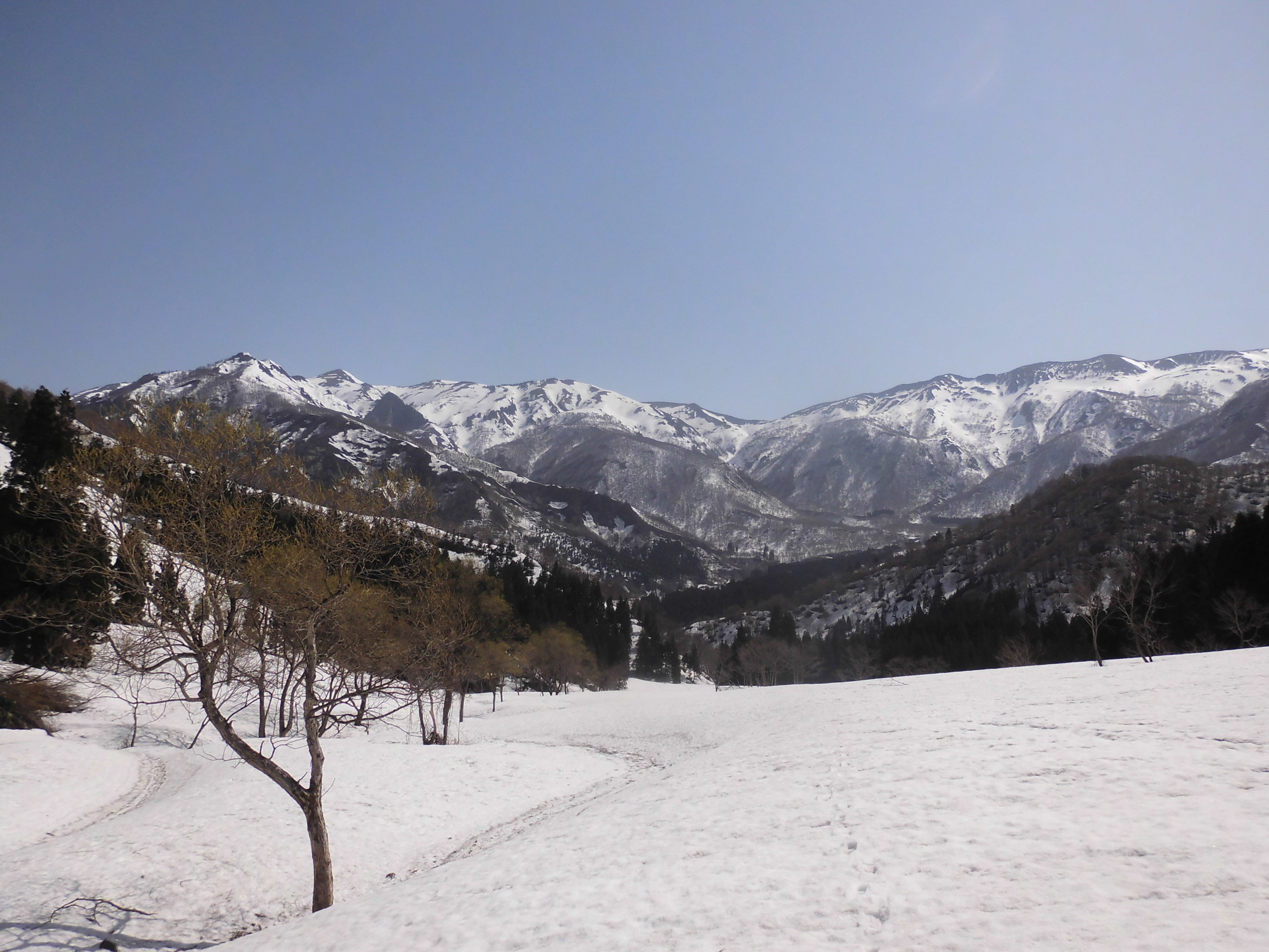 割引岳-巻機山-米子頭山あたりまでの山並。米子頭山は右側。新潟県南魚沼市側から東北東を向いて撮影。